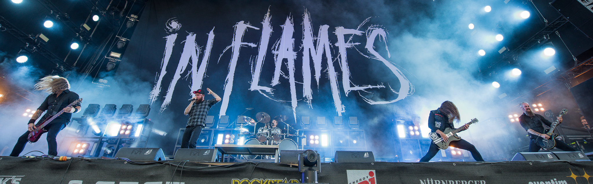 ARGO-Konzerte,Anders Fridén,Beck's Park Stage,Björn Gelotte,Daniel Svensson,Festival,In Flames,Konzert,Livekonzert,Livemusik,Musik,Niclas Engelin,Peter Iwers,RiP,Rock im Park 2015